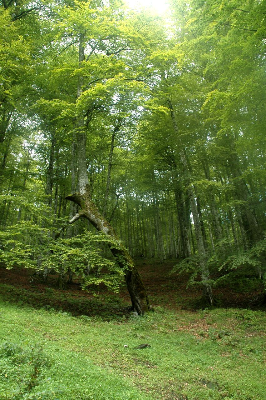 Bosque en Cantabria (España).